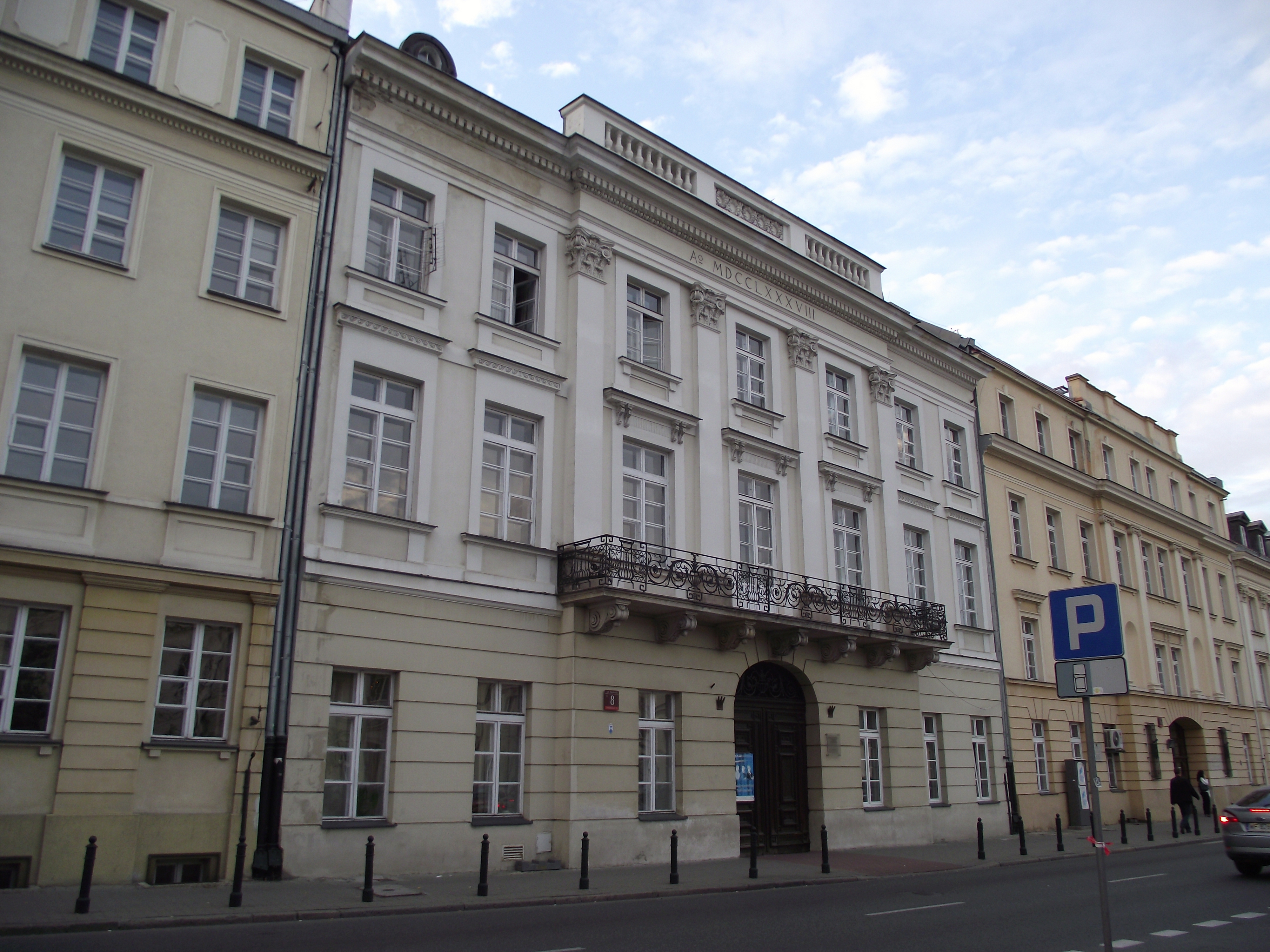 Zabytkowa kamienica z lat 1787-88, po zniszczeniu podczas II wojny światowej odbudowana w latach 1949-50. Ul. Senatorska 8, Warszawa, dz. Śródmieście